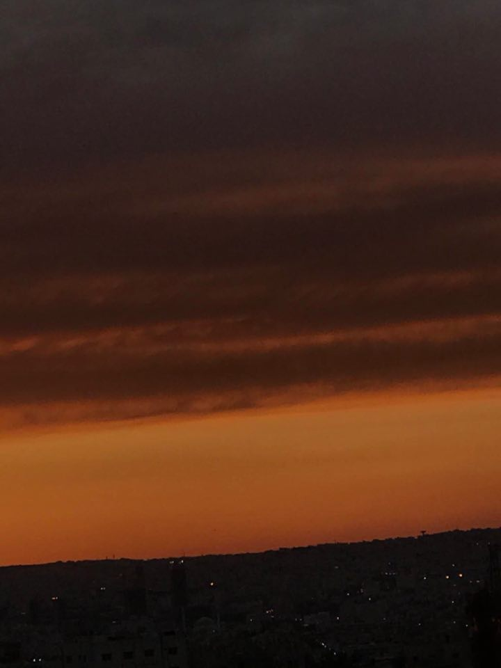 صورة جوية طولية لسماء منطقة القويسمة في عمان عاصمة المملكة الأردنية الهاشمية في فترة المساء